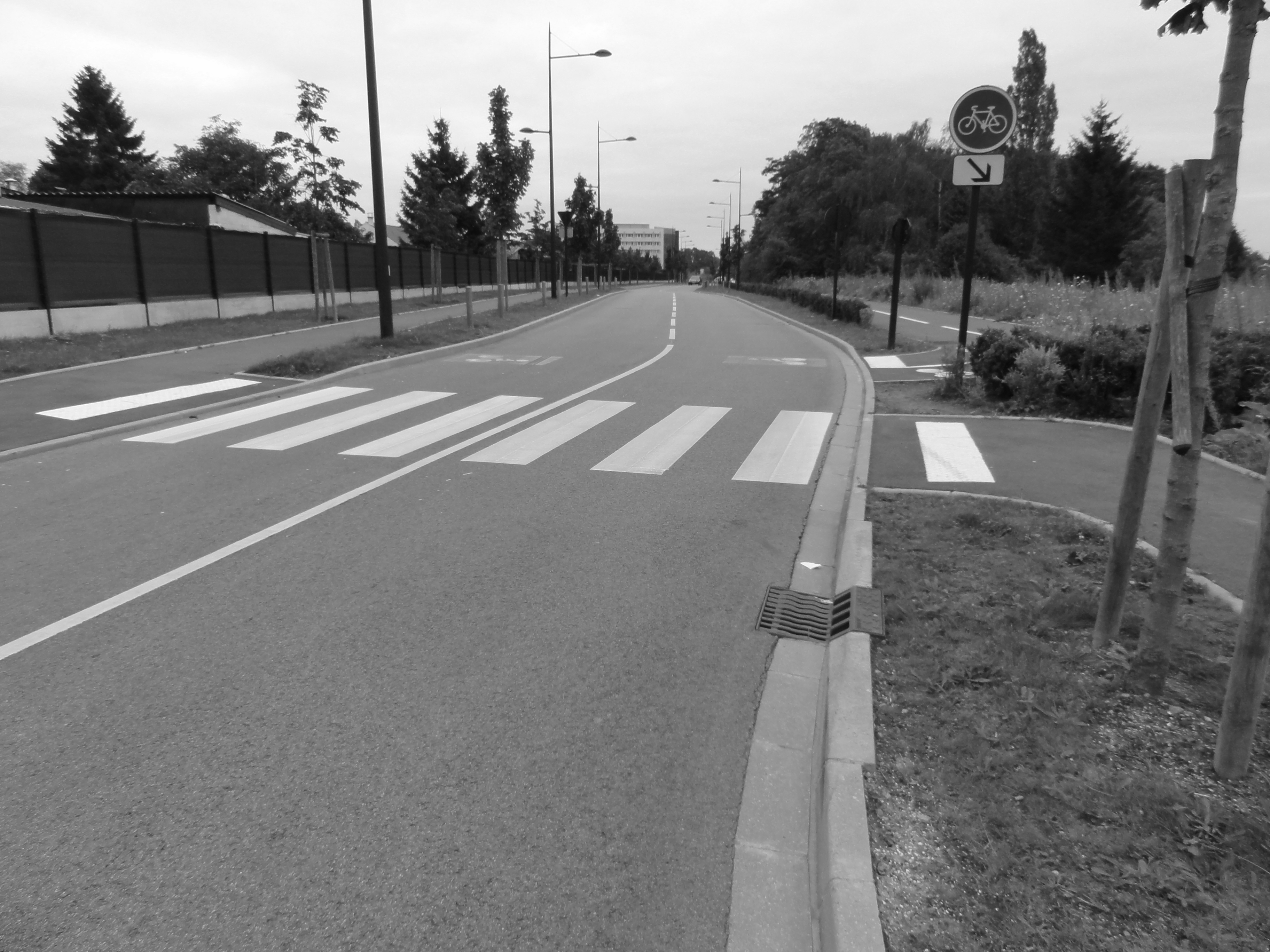 Terril n° 233 dit Cavalier du 3 de Lens, disparu, Fosse n° 3 - 3 bis de la Compagnie des mines de Lens, Liévin, Pas-de-Calais, Nord-Pas-de-Calais, France.